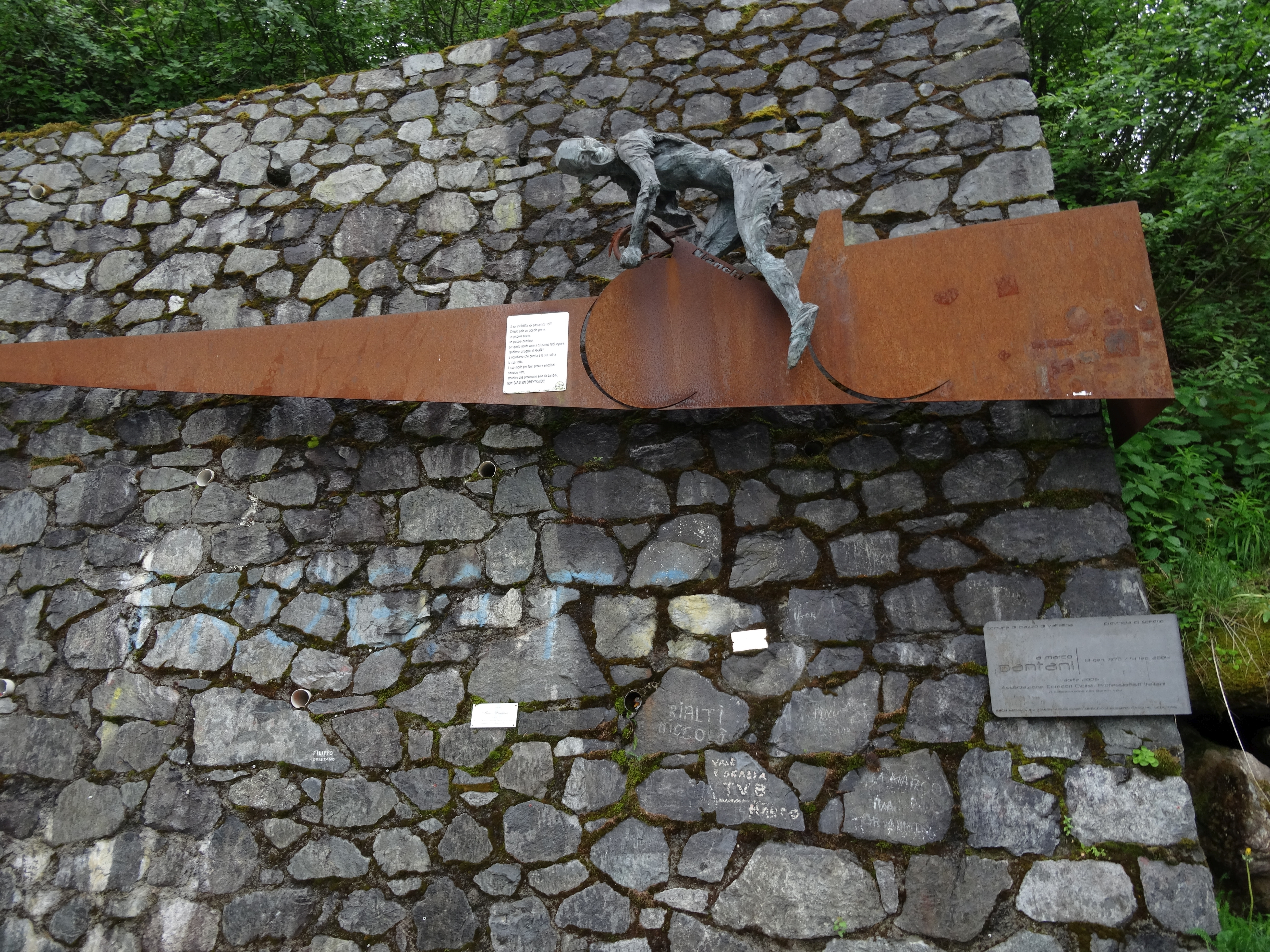 In 1990 werd de pas voor de eerste keer beklommen in de Giro d'Italia. Vrijwel alle keren werd de meest zware klim, die vanuit Mazzo di Valtellina, beklommen. Alleen in 1990 kwam men vanuit Monno. De renners vrezen de klim en zo beweerde Lance Armstrong dat dit wel de meest zware klim was die hij ooit had gereden. "It's a terrible climb...it's perfect for a mountain bike. On the hardest parts, I was riding a 39x27 and I was hurting, really hurting. (Mortirolo) is the hardest climb I've ever ridden." Marco Pantani brak in 1994 definitief door als klimmer door Indurain en latere winnaar Berzin op de Passo del Mortirolo uit het wiel te rijden. Hij won de etappe en werd dat jaar tweede in de Giro. Hij reed ook de snelste tijd ooit op de Mortirolo; 42 min en 32 sec. From Mazzo di Valtellina: The actual climb to the summit starts at Mazzo di Valtellina and is 12.4 kilometres long at an average of 10.5% (height gain: 1300 m), the maximum gradient being 18%